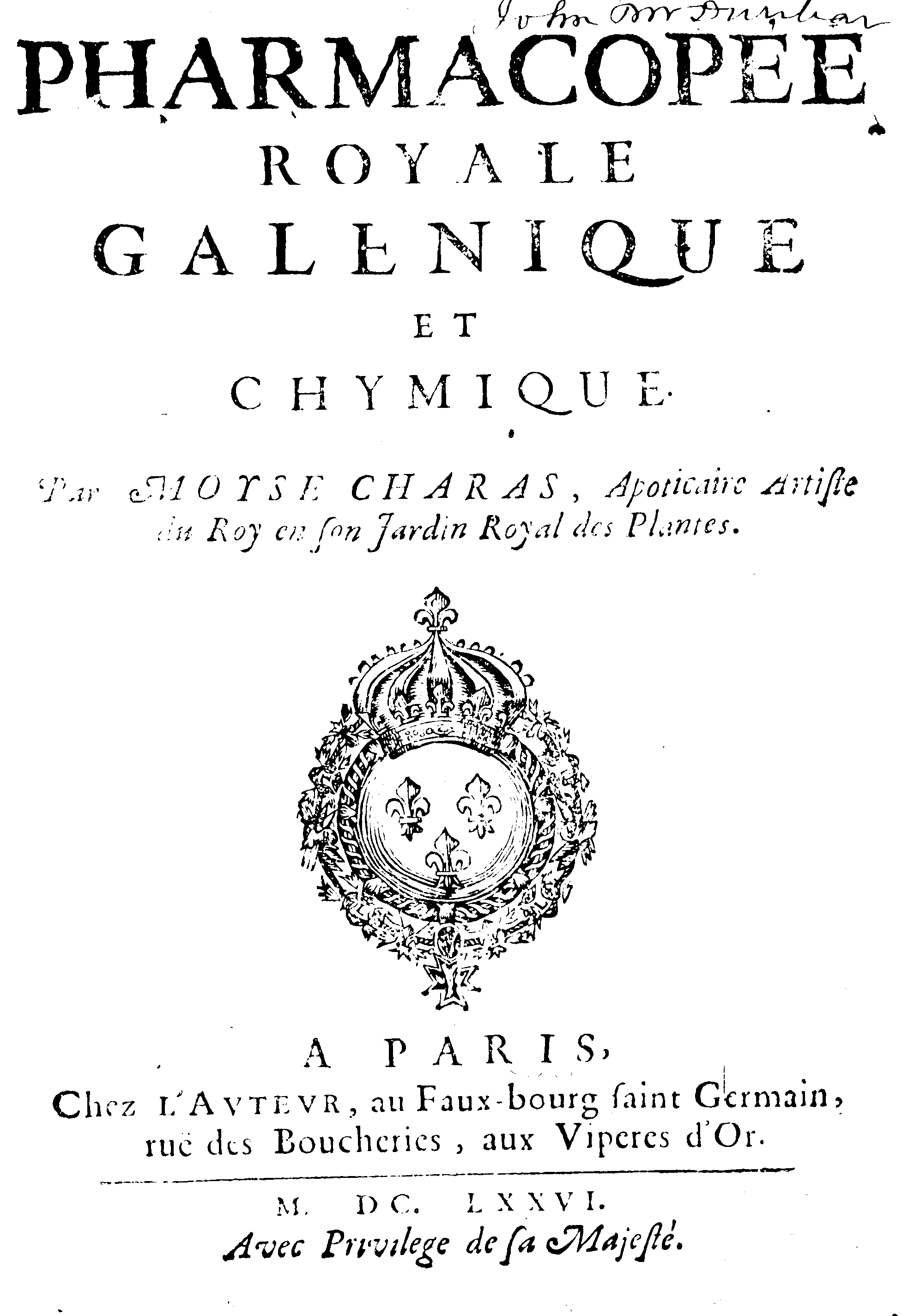 Title page of "Pharmacopée royale galénique et chimique" by French pharmacist Moyse Charas (1619-1698)